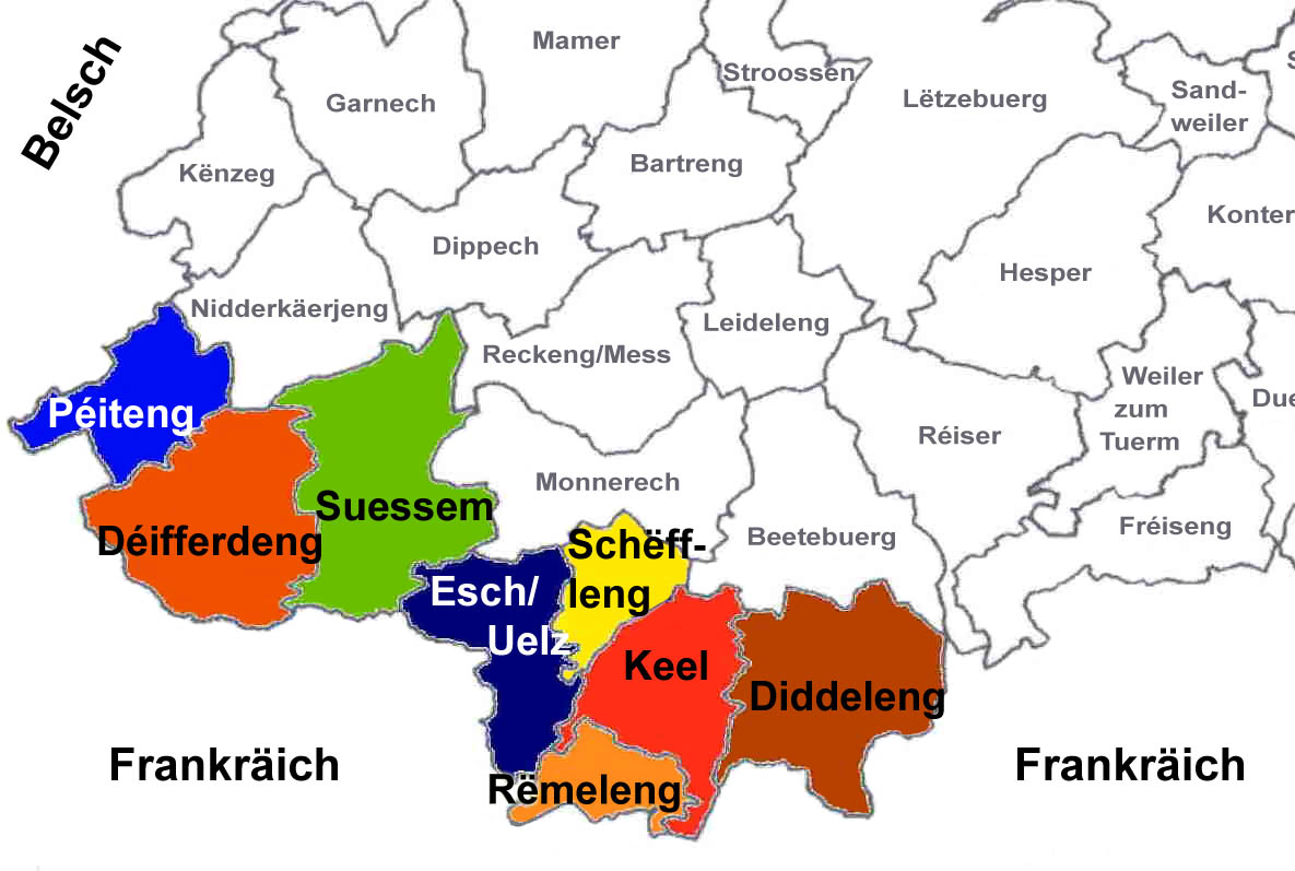 Plang vun de Südgemengen. Skizz: SITCK Iwwersetzung: Otets